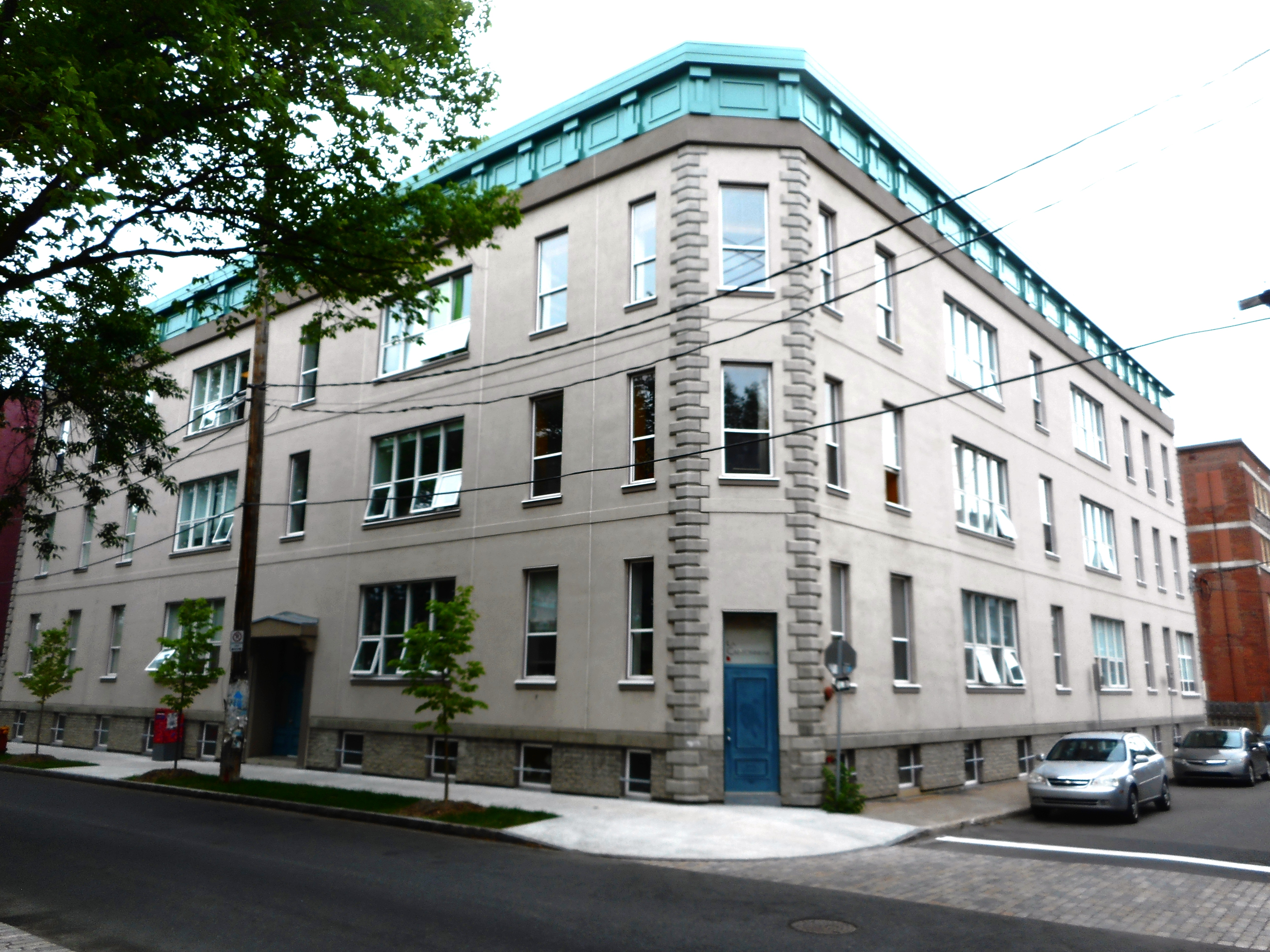 La Cartonnerie (résidence), 485, boulevard Langelier / rue Christophe-Colomb Est, Québec